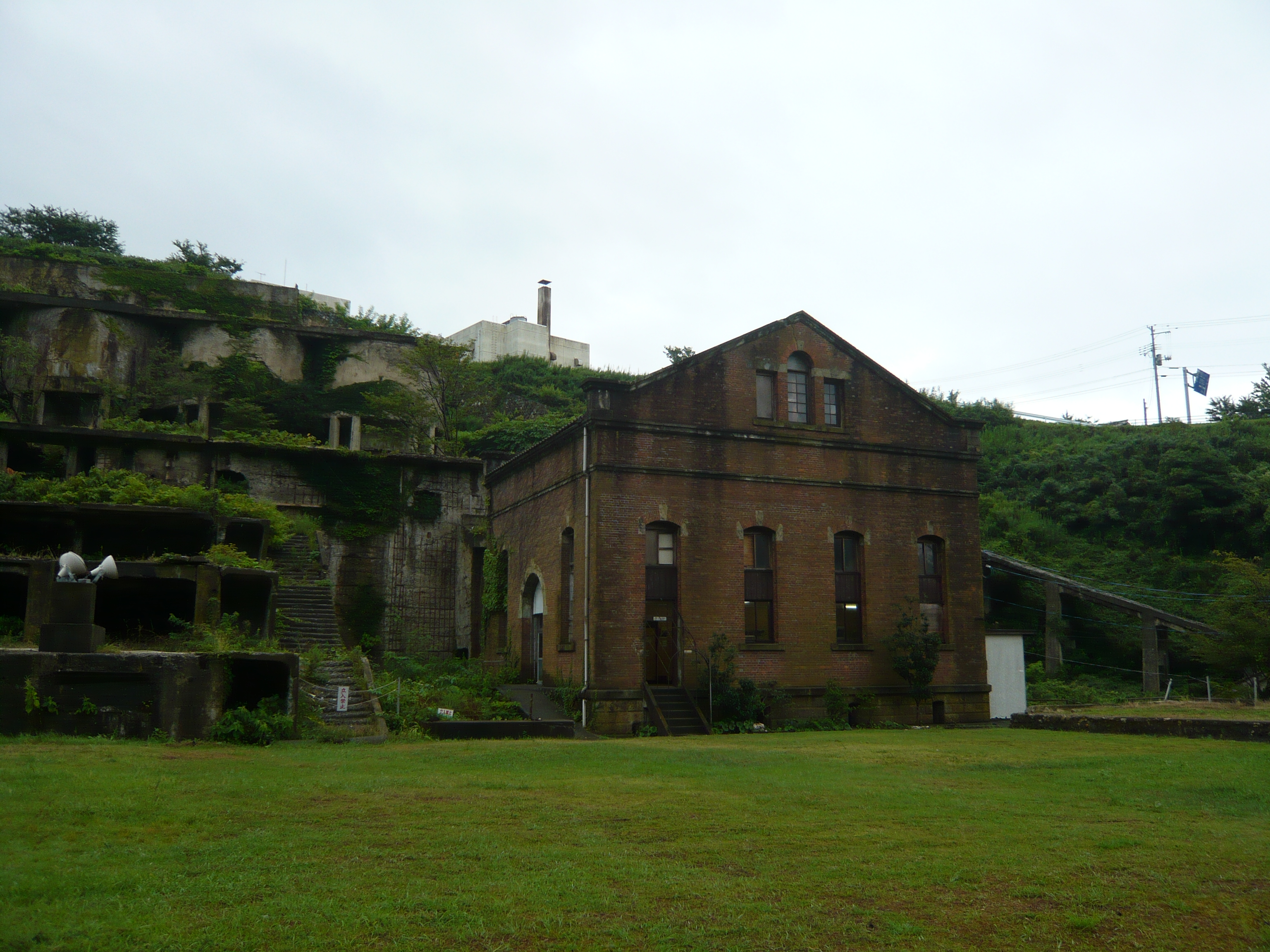 佐渡金山・北沢地区